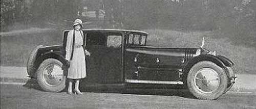 Avions 1930 Voisin 28CV Type C20 coupé "Siroco", V-12 cyl., 4890 cc., 115 bhp.